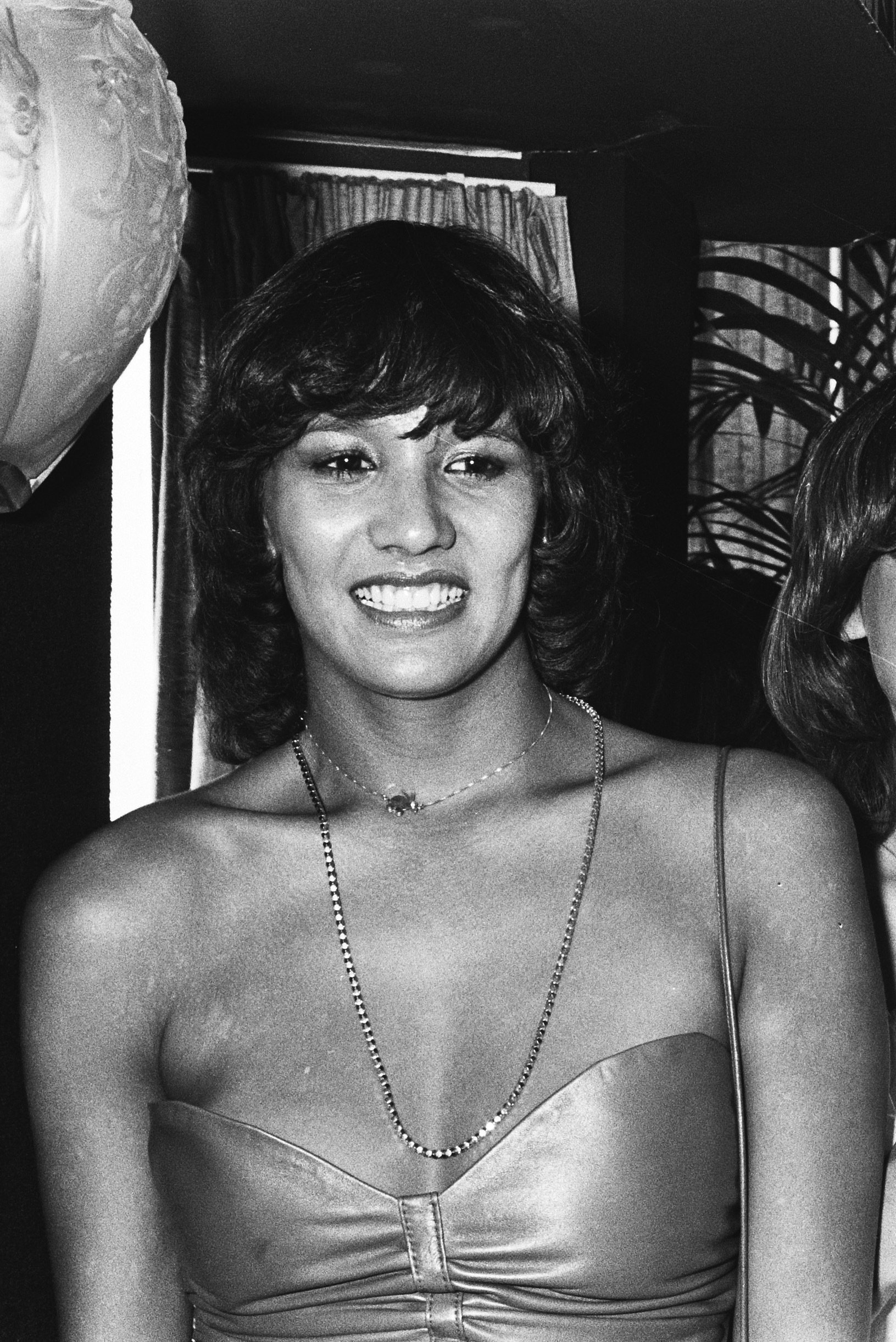 Luv' in 1979